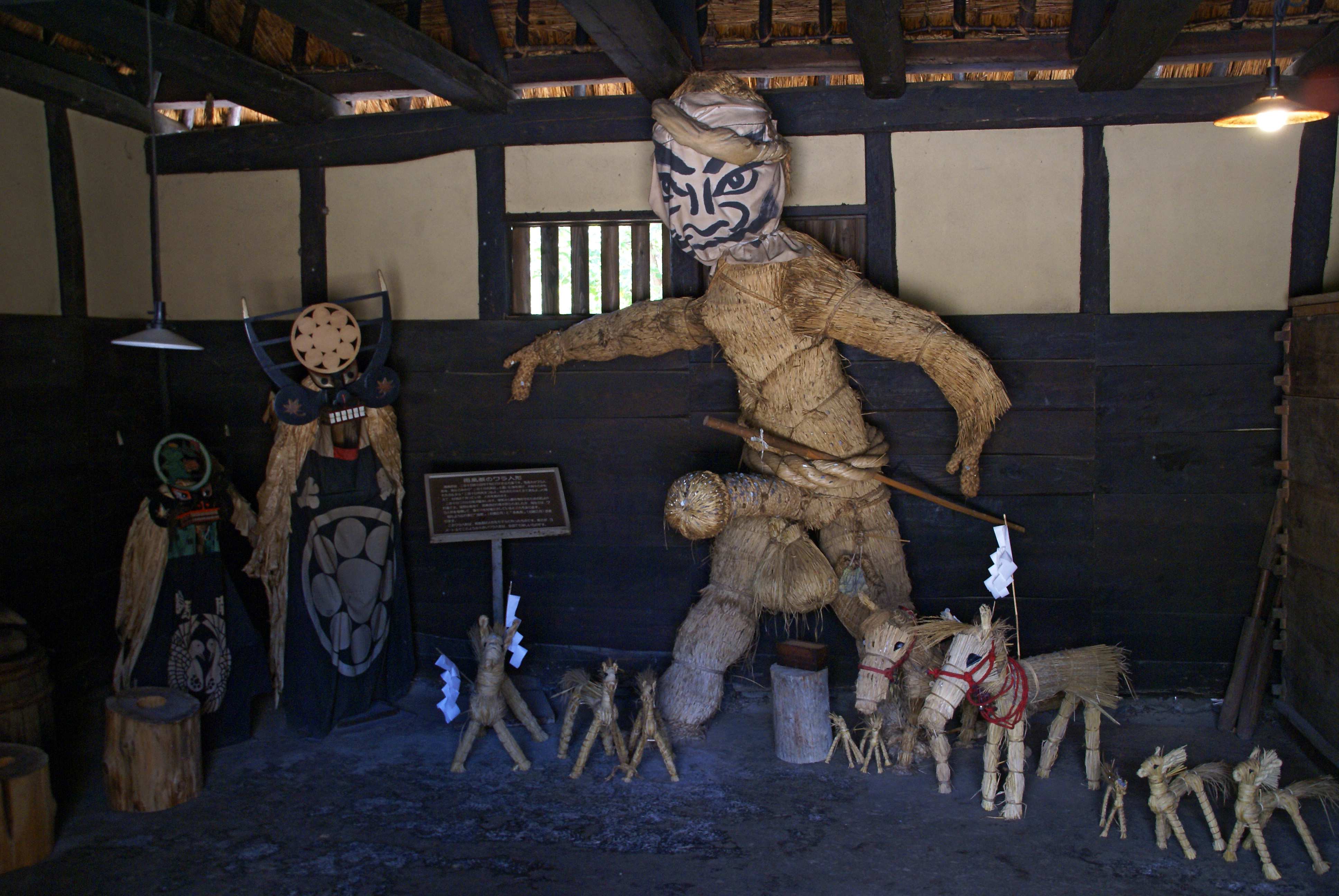 Tono Furusato-mura in Tono, Iwate prefecture, Japan